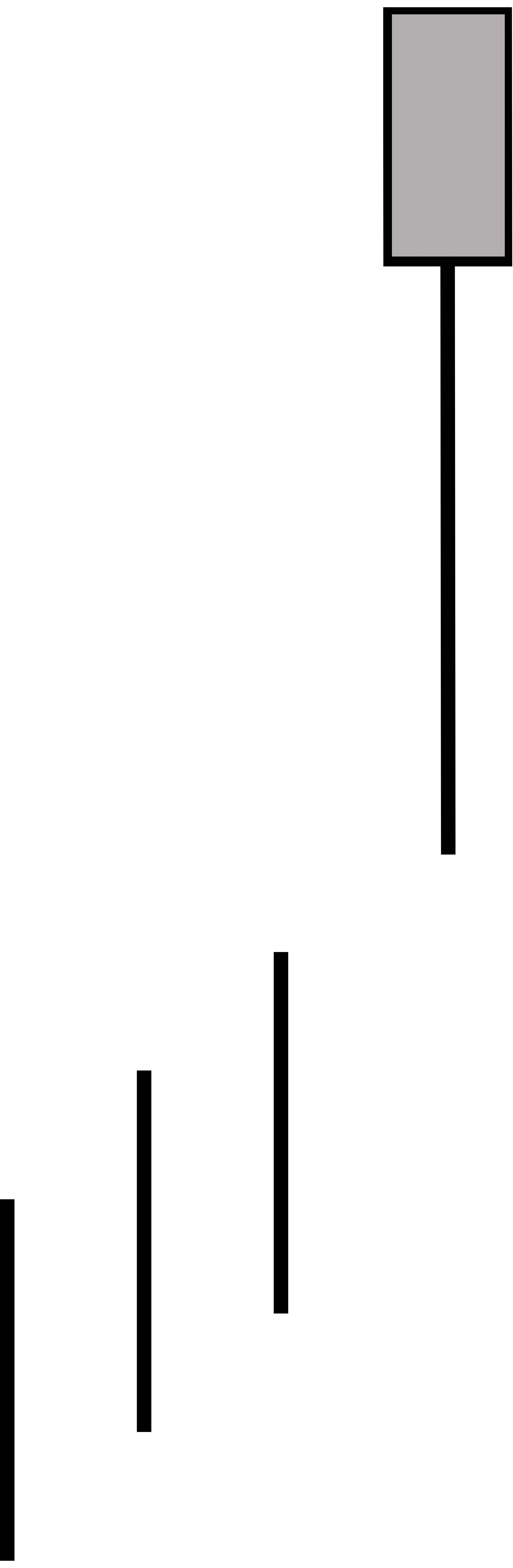 Hanging man